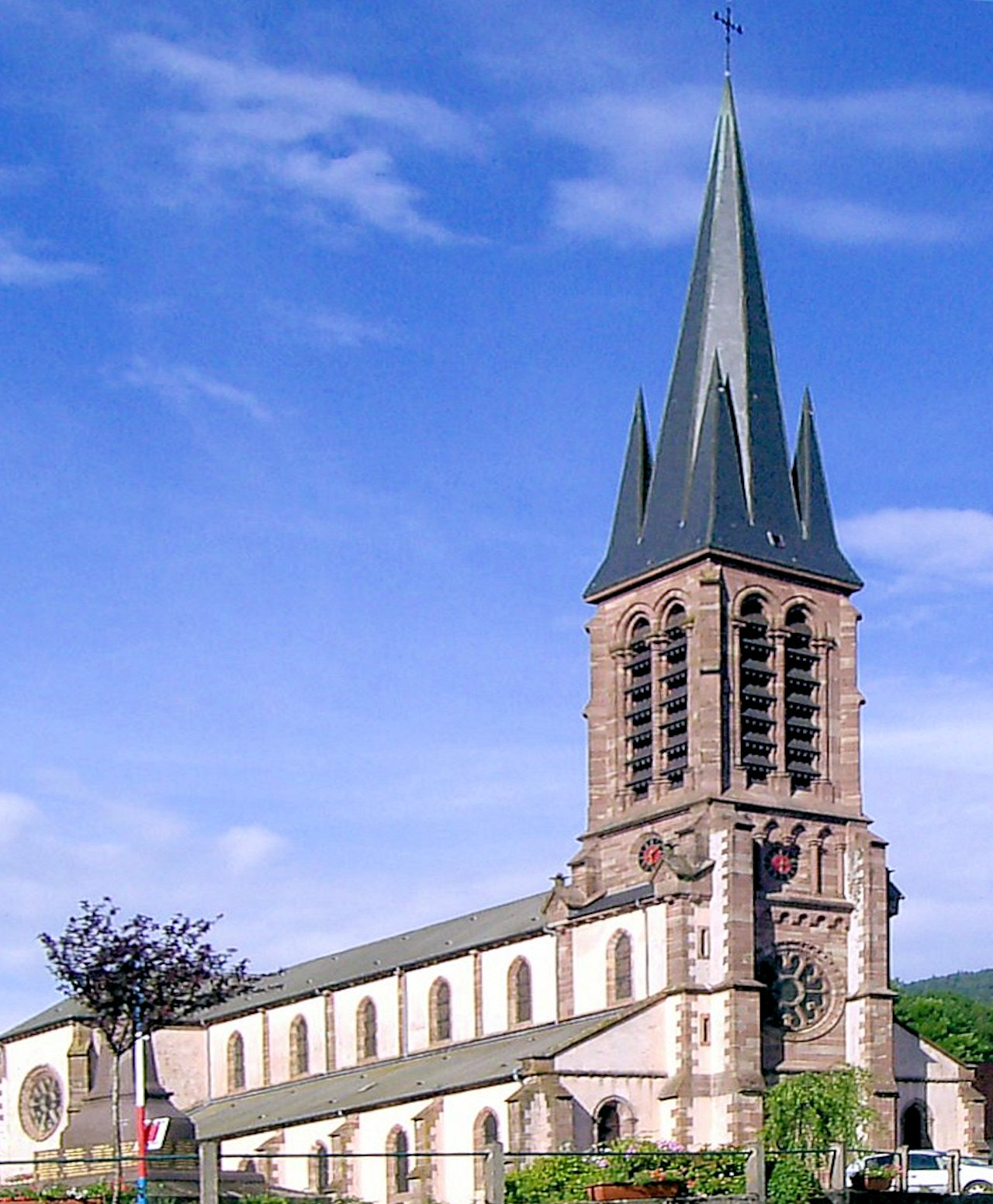 L'église Saint-Maurice à Saint-Maurice-sur-Moselle